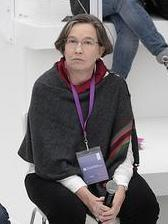 Bajo el título La ciudad en su circunstancia: la ciudad de los cuidados, Ganarás la luz ha querido insertar dentro del programa que ha traído a la Feria Internacional del Libro de Guadalajara un debate que trasciende al ámbito literario para embeber todas las esferas de la vida ciudadana: los cuidados. En una charla moderada por Antonio Lafuente, investigador Consejo Superior de Investigaciones Científicas (CSIC) en el área de estudios de la ciencia, se han dado cita Raquel Gutiérrez Aguilar, matemática, filósofa, socióloga y activista mexicana, profesora de la Universidad de Puebla, y Javier Segura, subdirector general de Prevención y Promoción de la Salud del organismo autónomo Madrid Salud (Ayuntamiento de Madrid). Una charla a la que se sumó el coordinador general de Alcaldía, Luis Cueto.